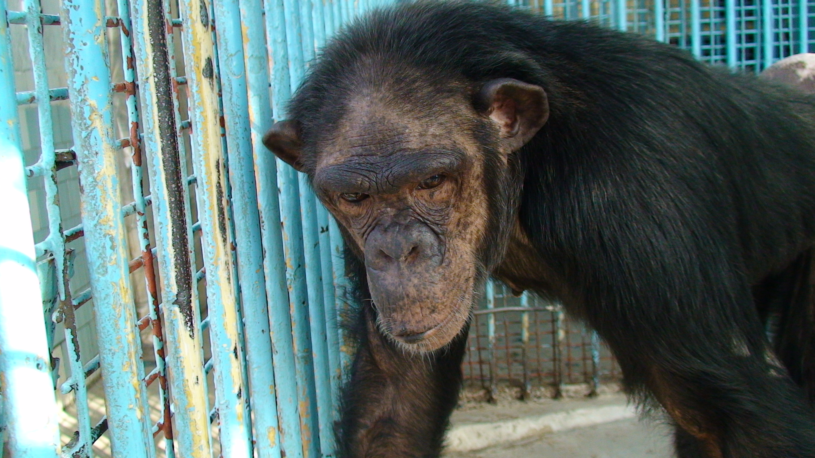 Шимпанзе Джина/Chimpanzee